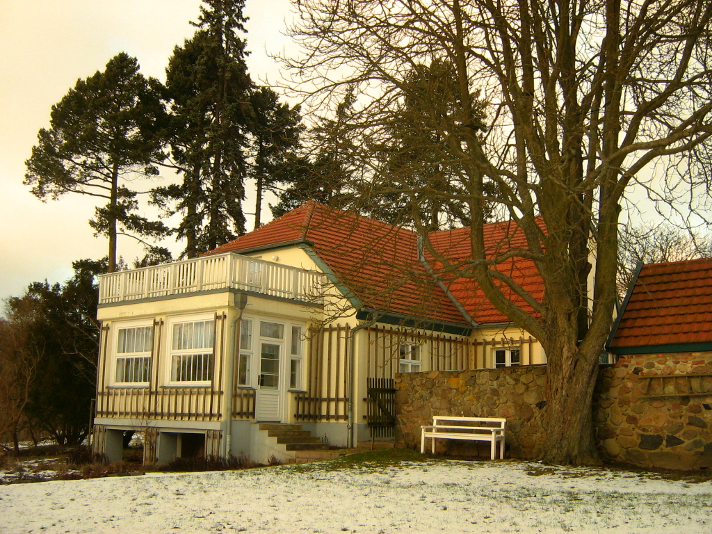 Das Wohnhaus Hans Falladas in Carwitz (Gemeinde Feldberger Seenlandschaft) in Mecklenburg.